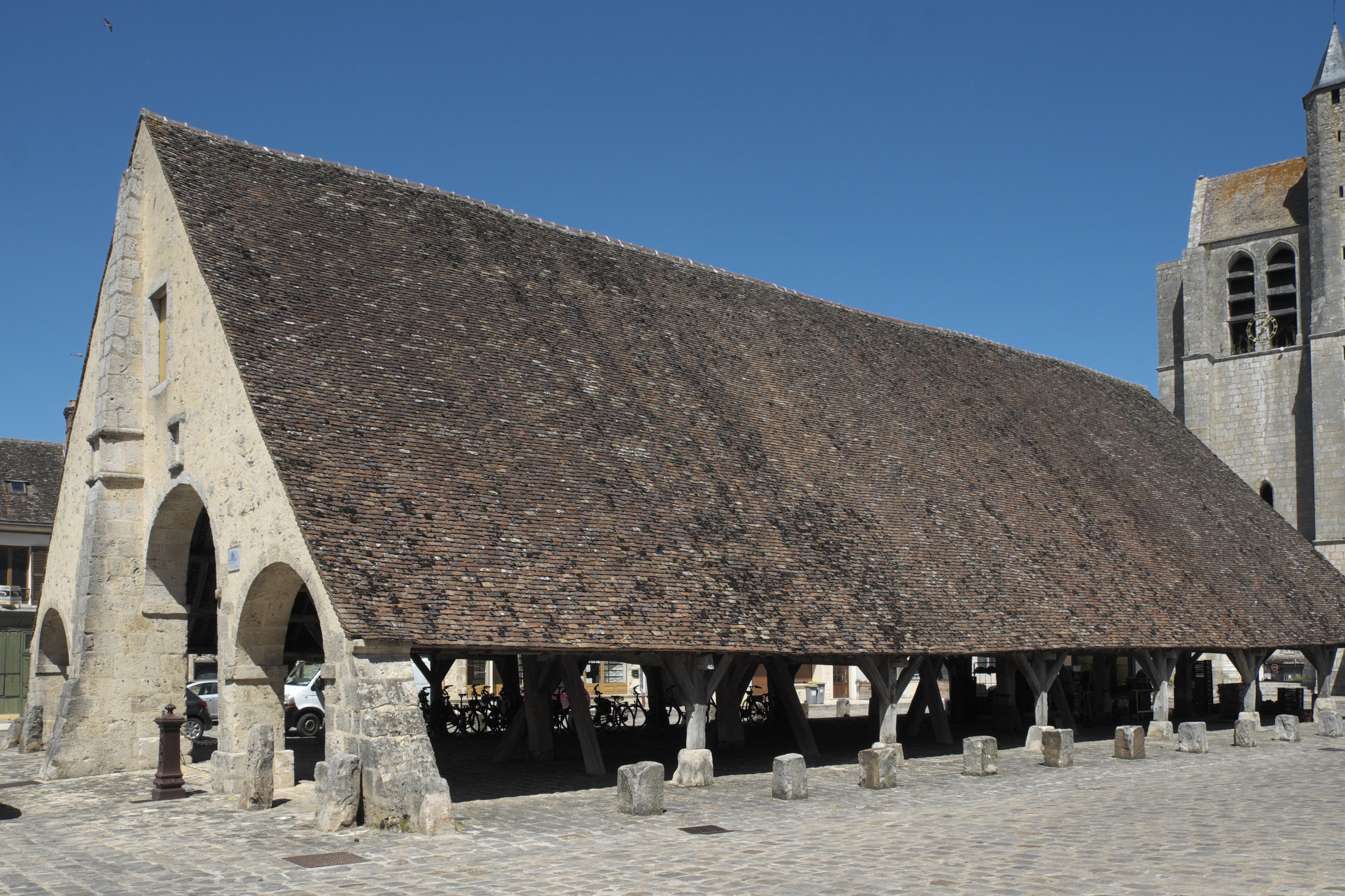 Markthalle in Égreville im Département Seine-et-Marne (Region Île-de-France/Frankreich)